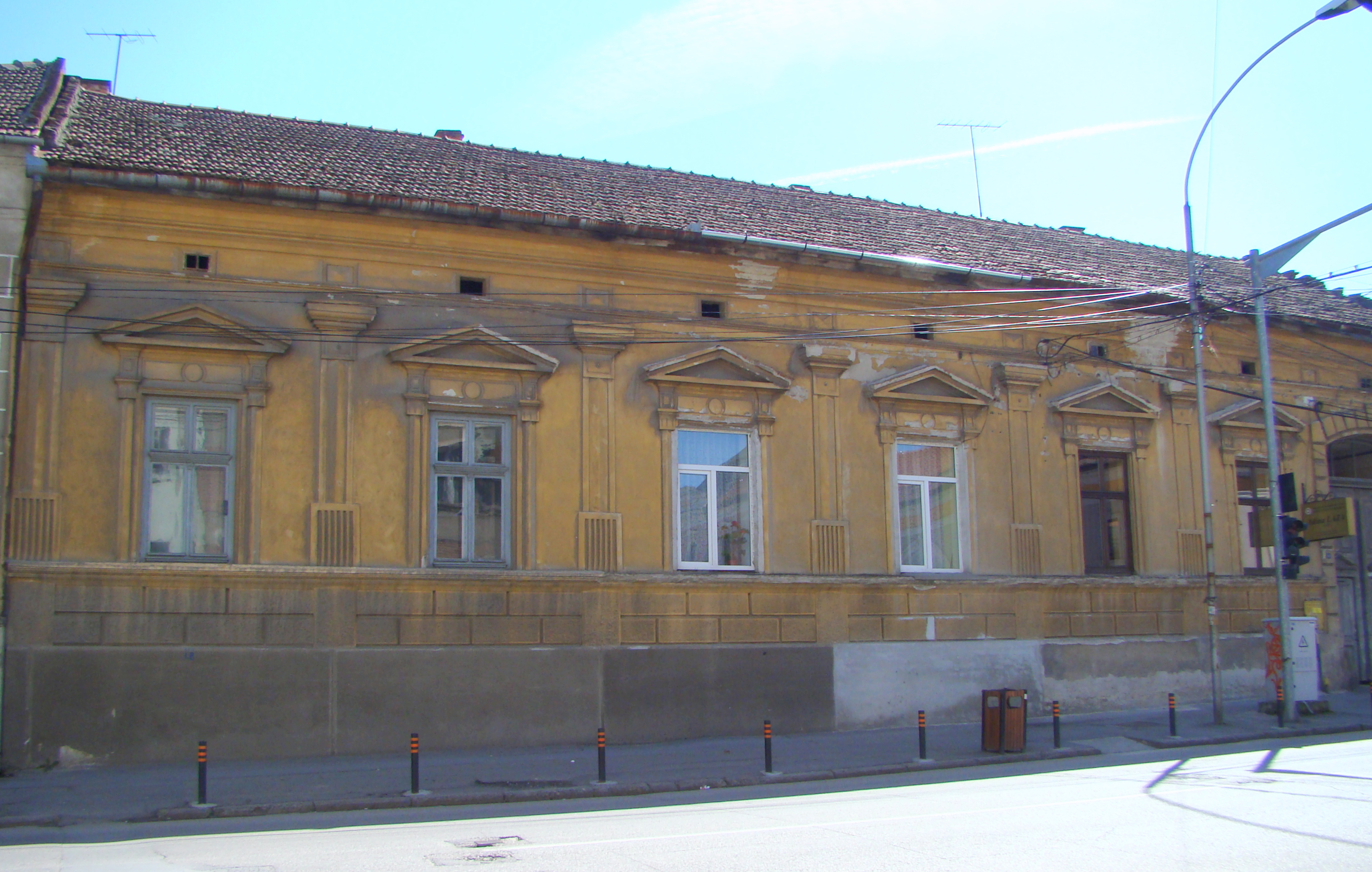 Ansamblul urban „Str. Libertății”, municipiul Deva, str. Libertății 9, 11 07